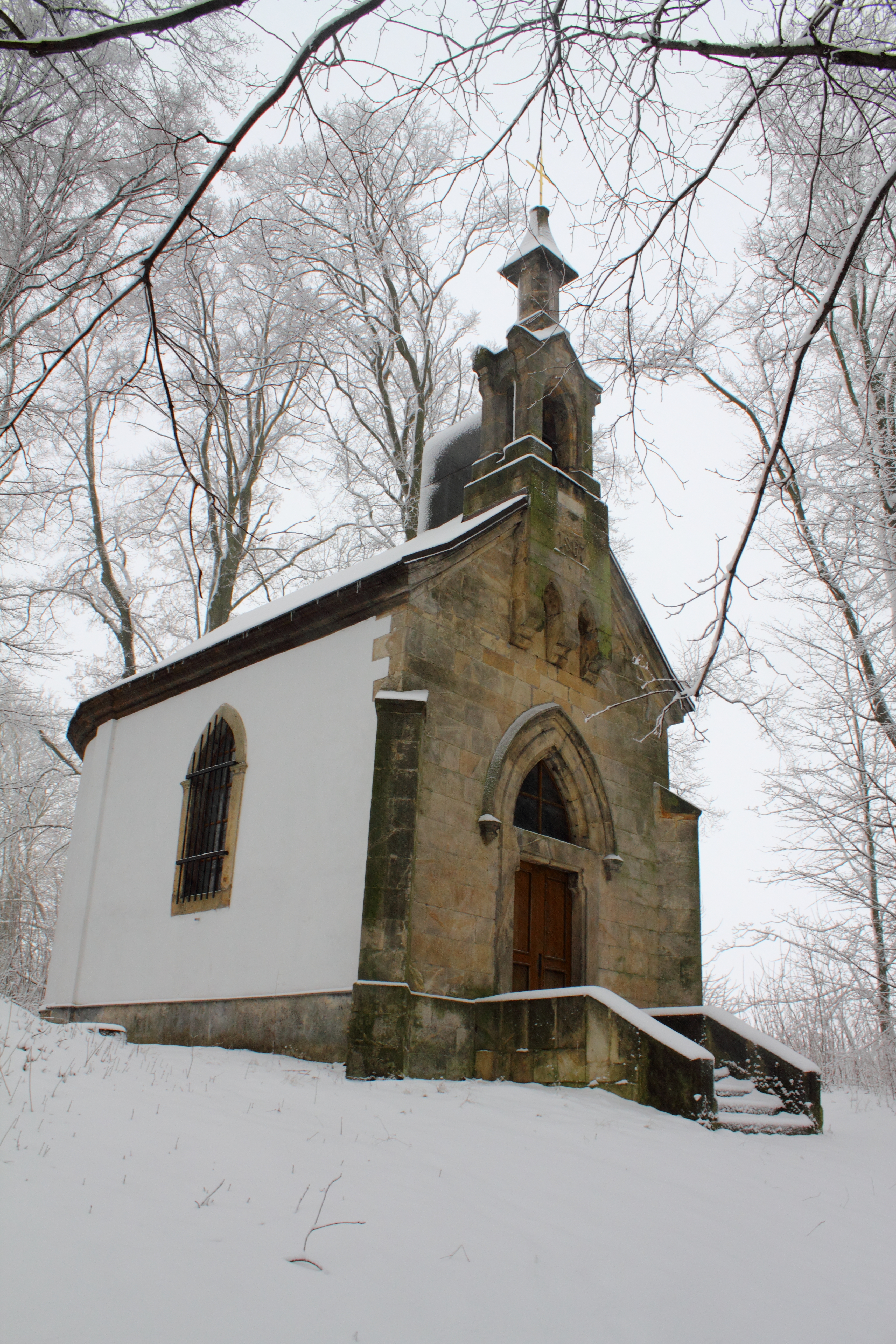 Kaple na konci kalvárie, Hodkovice nad Mohelkou